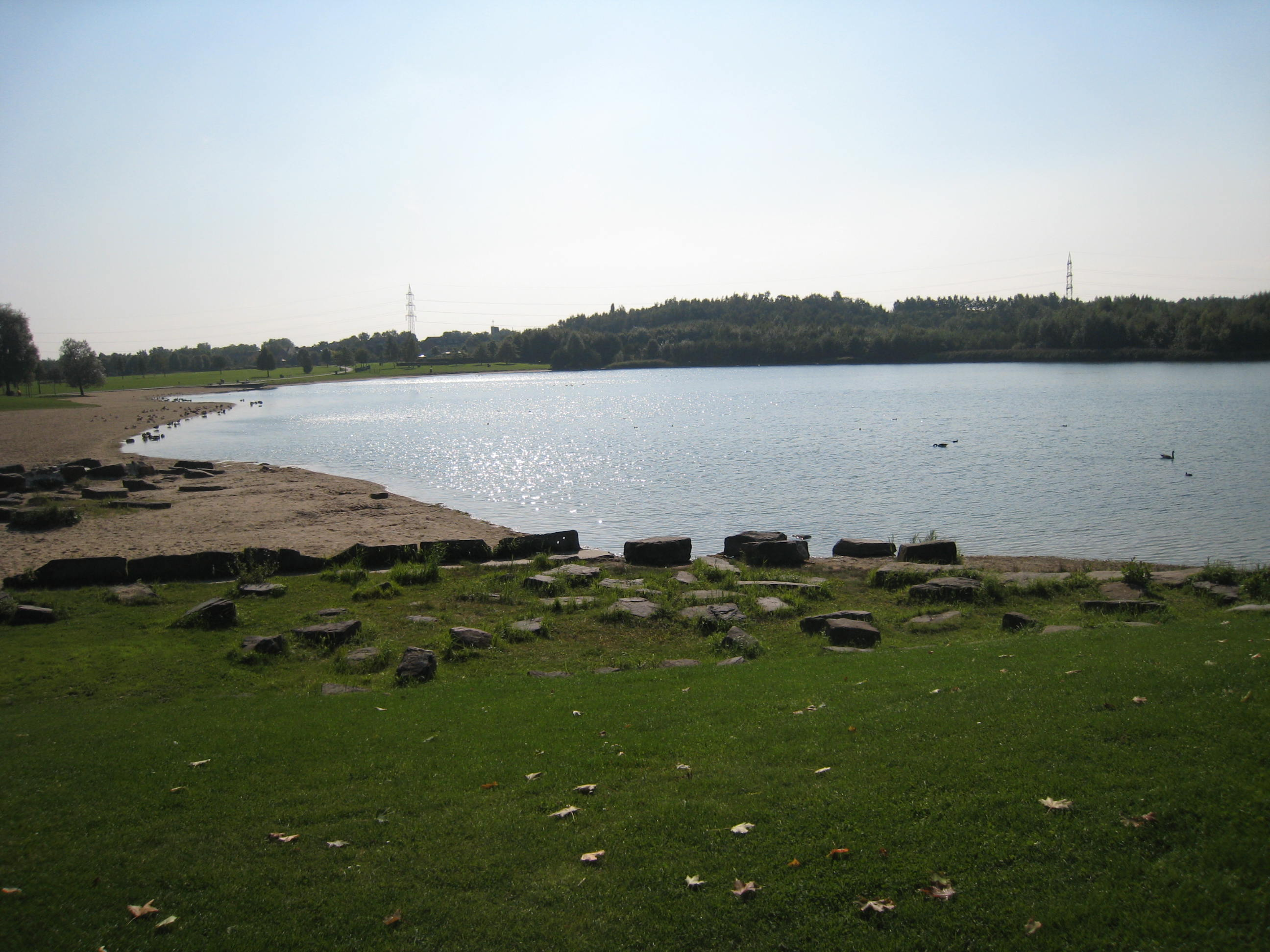 Horstmarer See, Seepark Lünen, Nordrhein-Westfalen